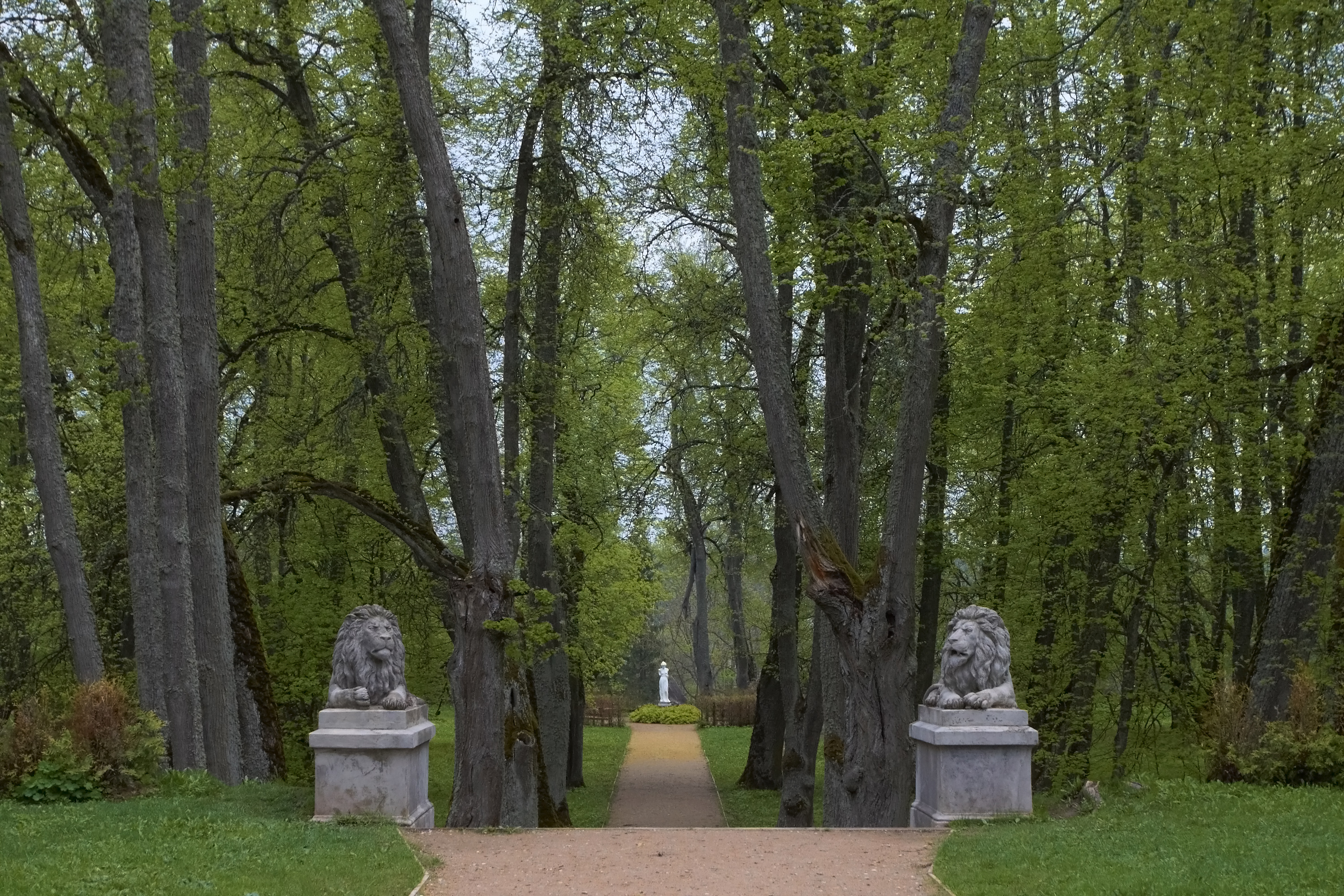 Luke mõisa pargitrepp kahe lõvifiguuriga, mai 2010